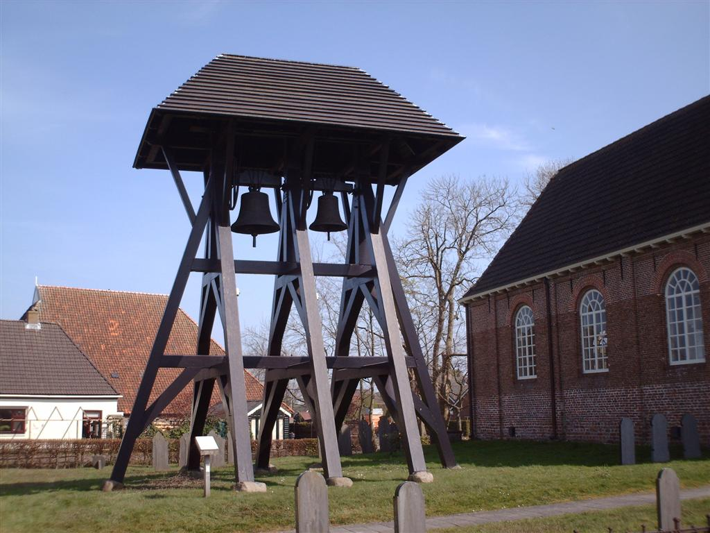 Klokkenstoel Donkerbroek